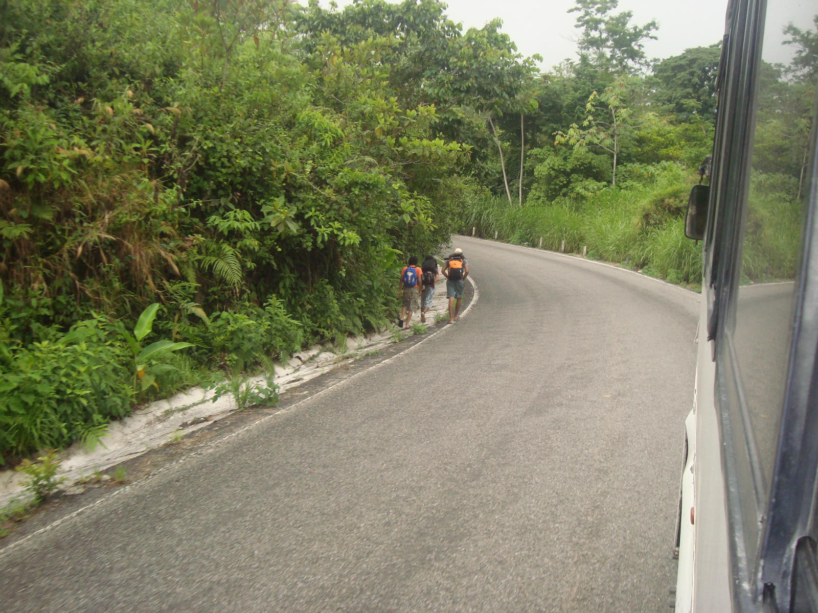 Personas caminando rumbo a Tila, exponiendose a un peligro ya que la carretera es de curvas cerradas y angosta